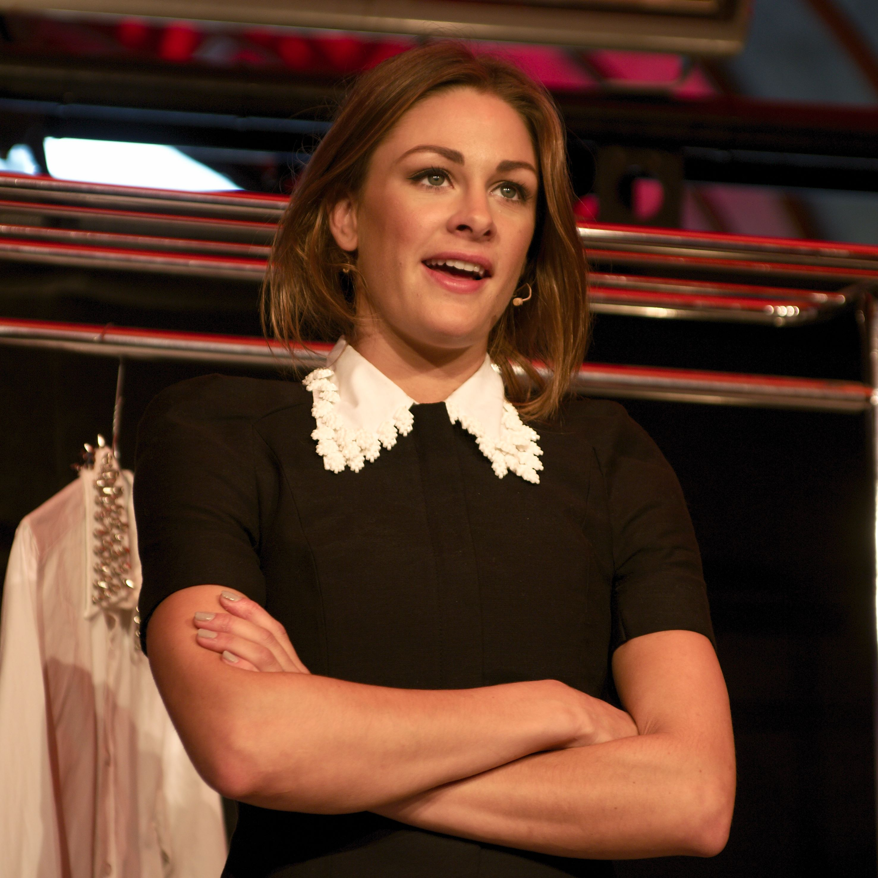 Jenny Skavlan at Oslo bokfestival.